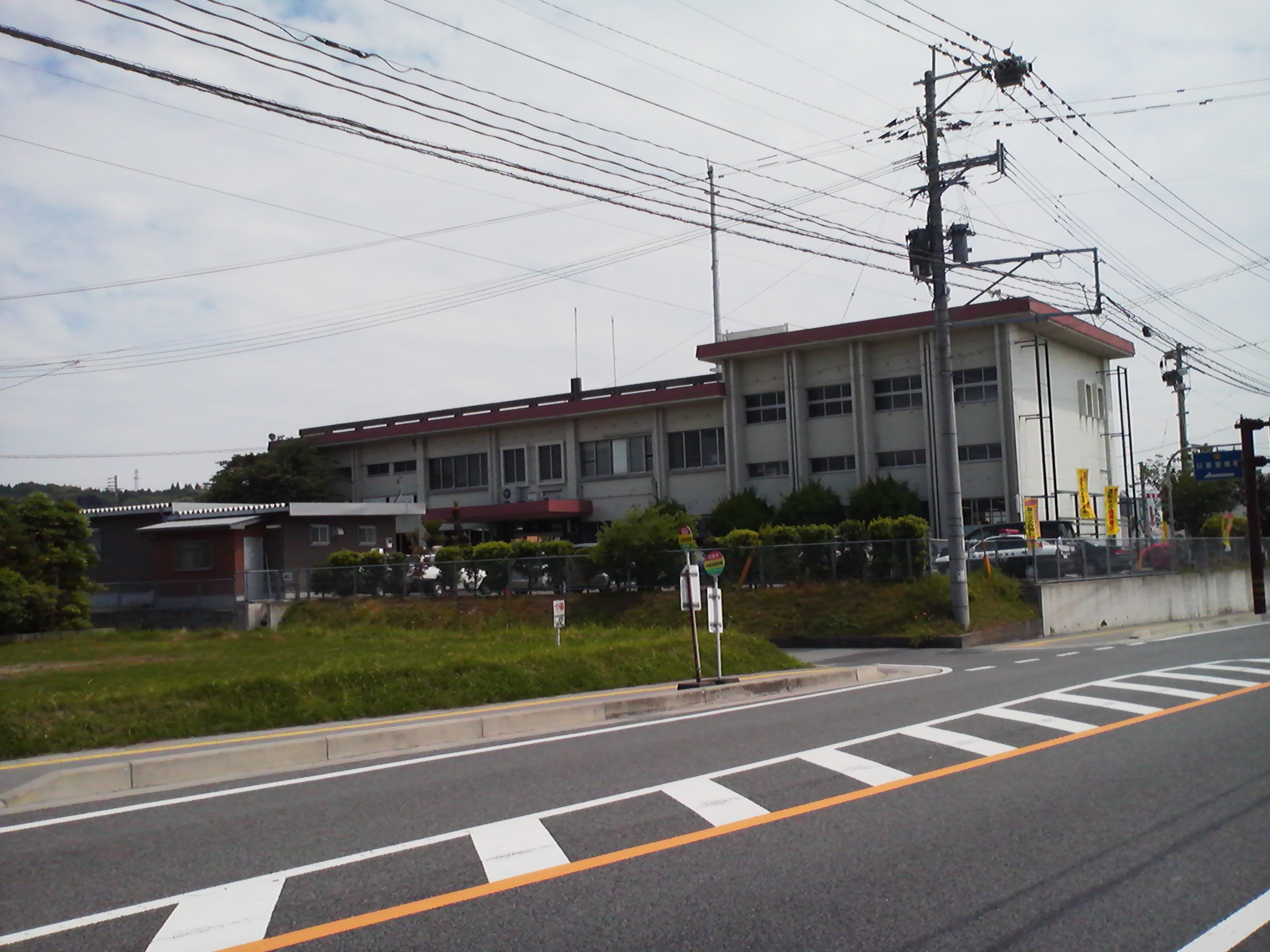 日置警察署の外観